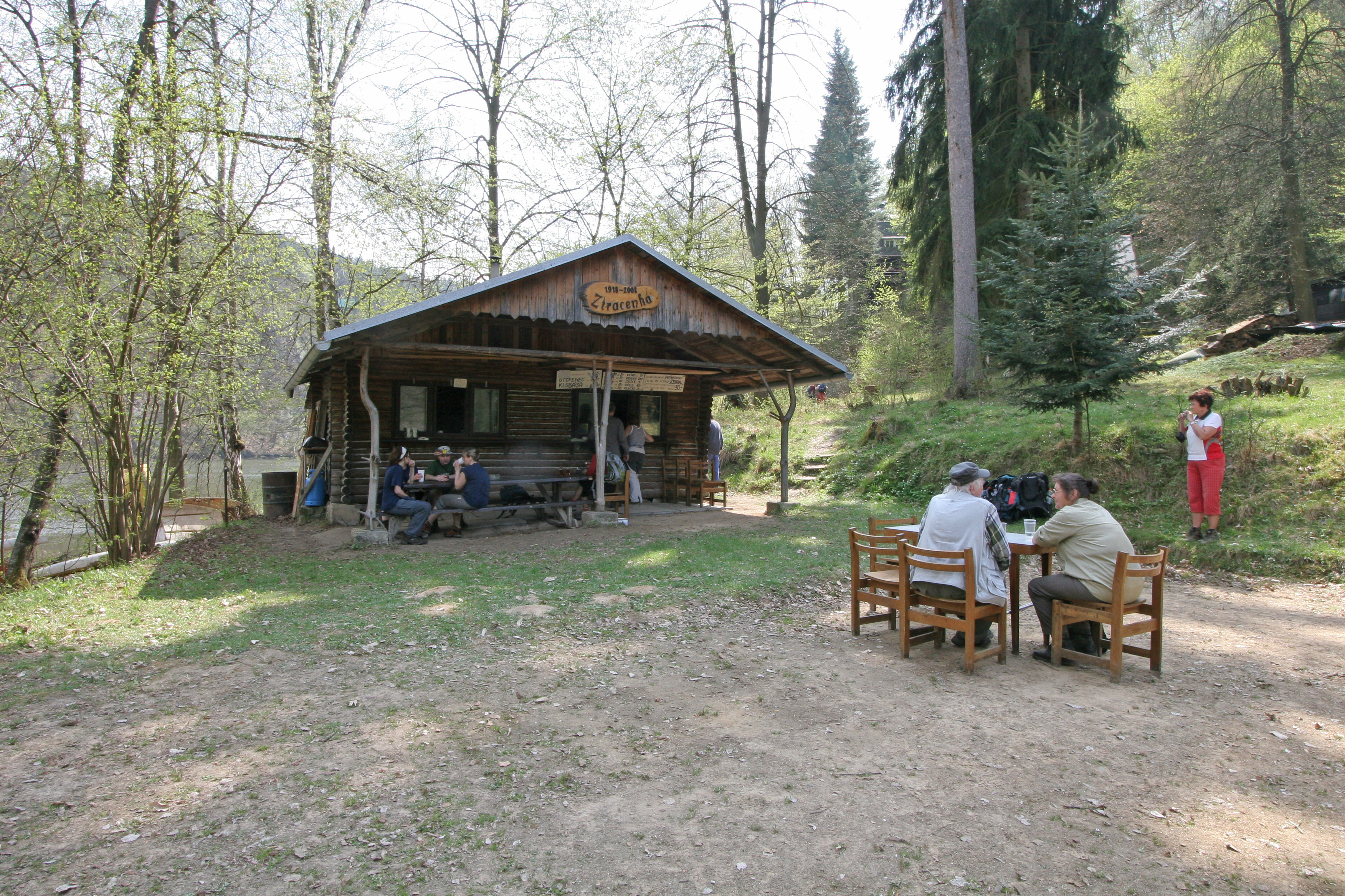 Trampská osada Ztracená naděje - osvěžovna